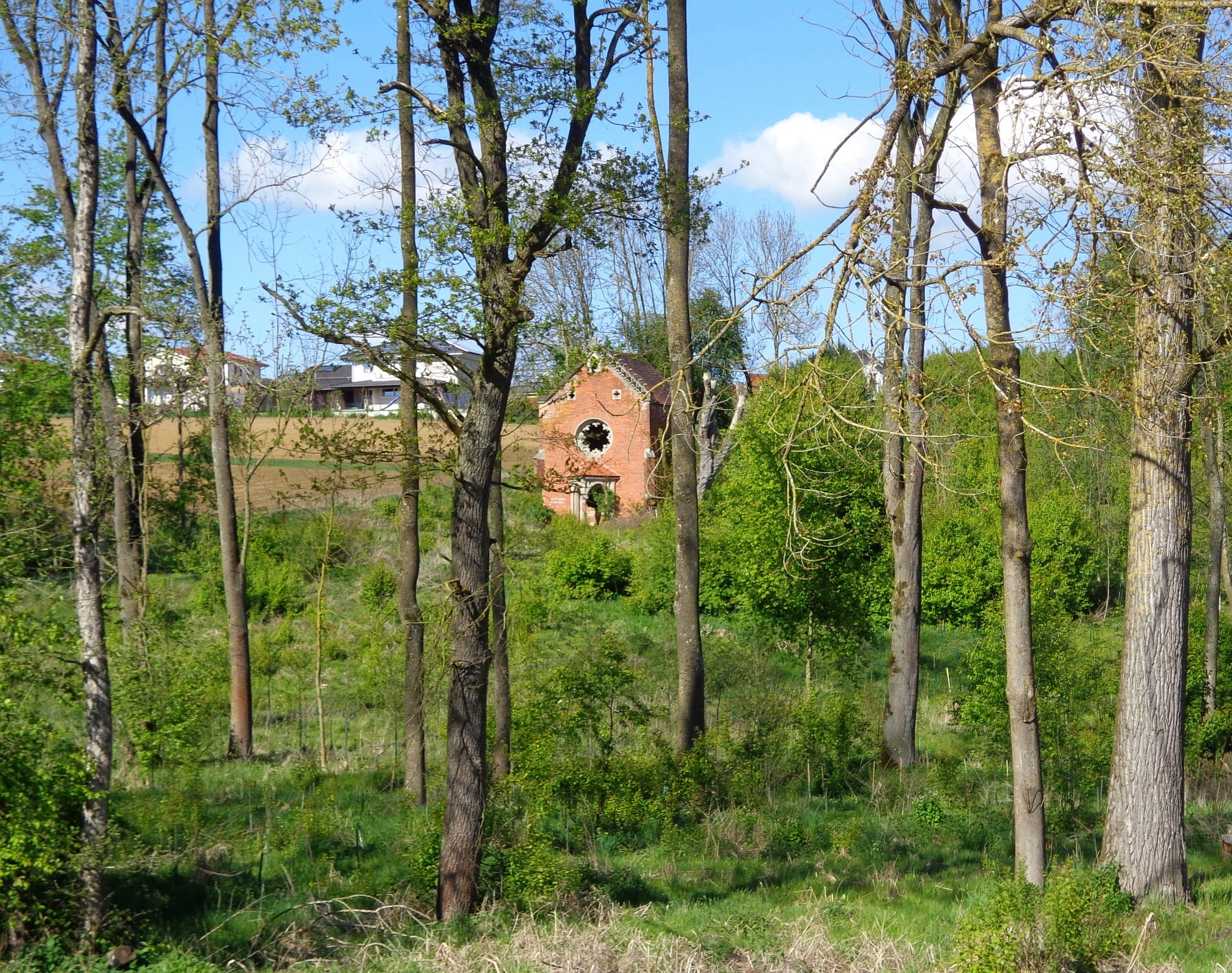 ehemalige Gruftkapelle der Grafen Tauffkirchen-Kleeberg in Trostling bei Ruhsdorf an der Rott, Niederbayern